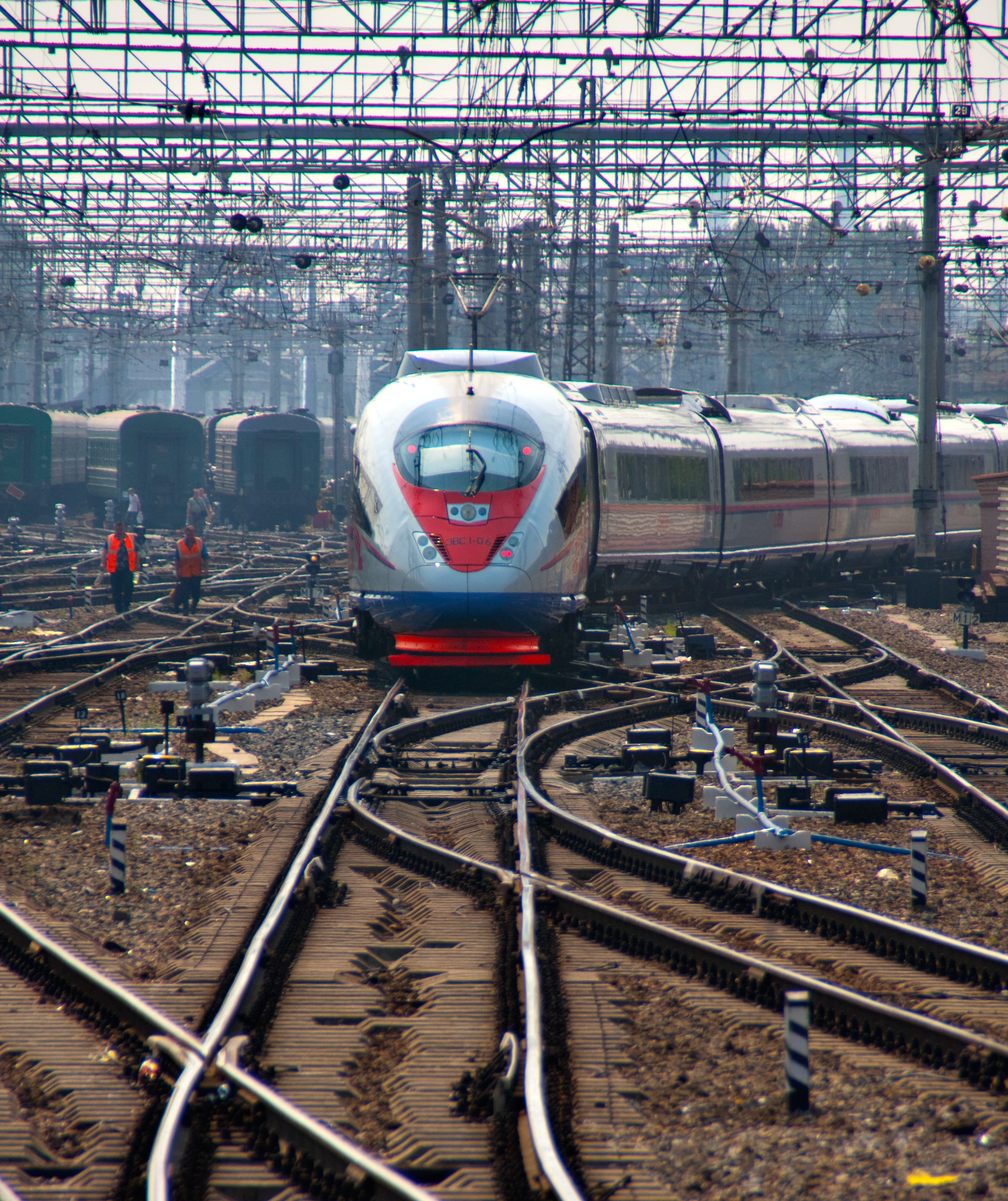 Организация скоростного движения на участке Санкт-Петербург–Москва